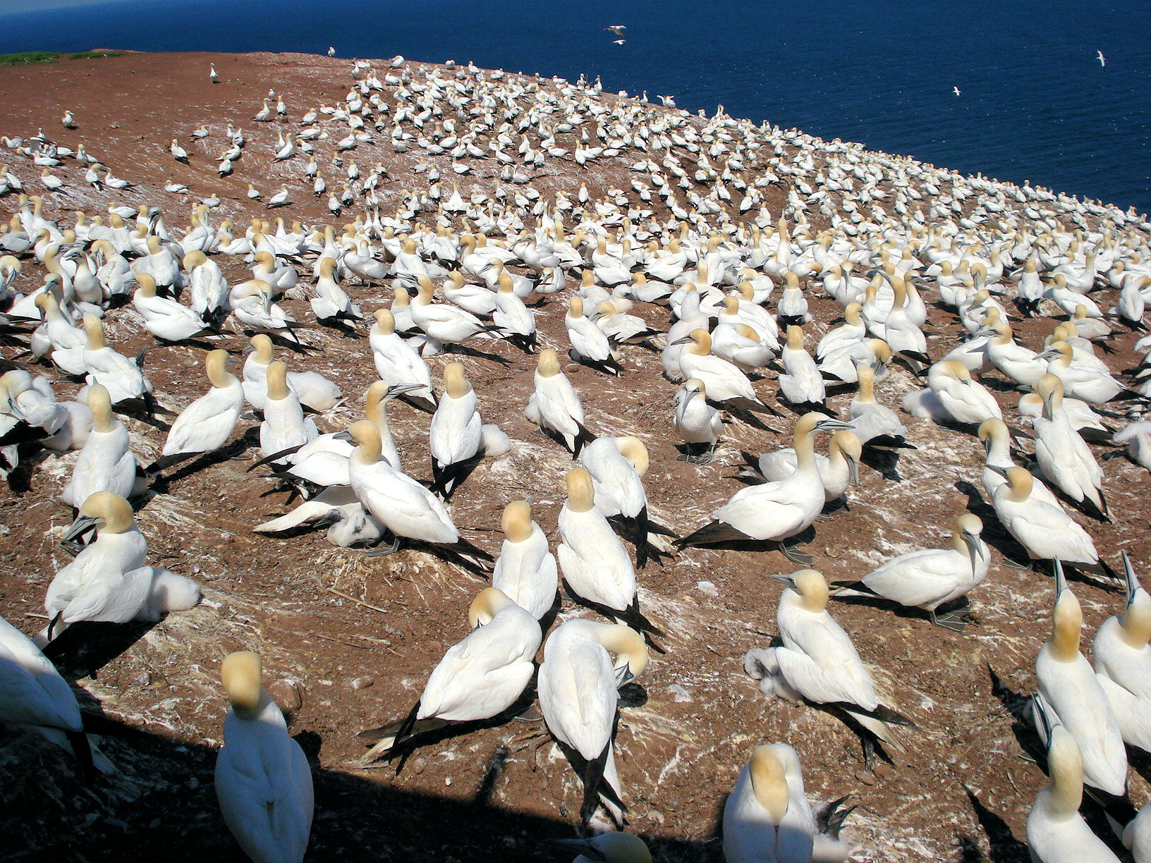 colonie de fous de Bassans sur l'île Bonnaventure en face du rocher Percé en Gaspésie (Québec)